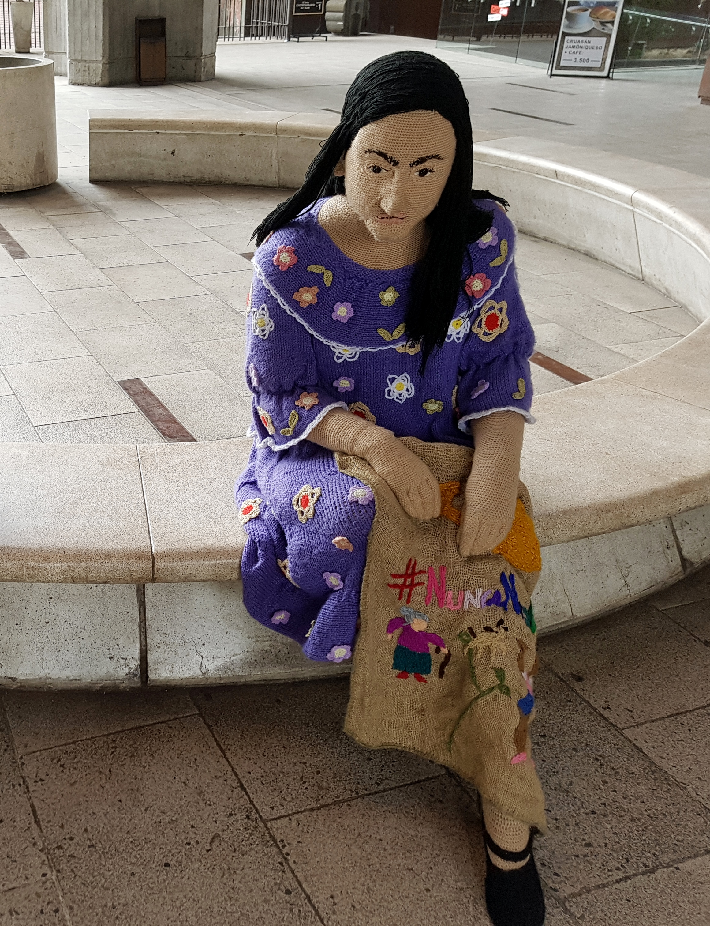 Escultura en lana de Violeta Parra, obra de la artista y diseñadora teatral Macarena Ahumada; plaza (patio) central del Centro Cultural Gabriela Mistral (GAM), en Santiago de Chile.